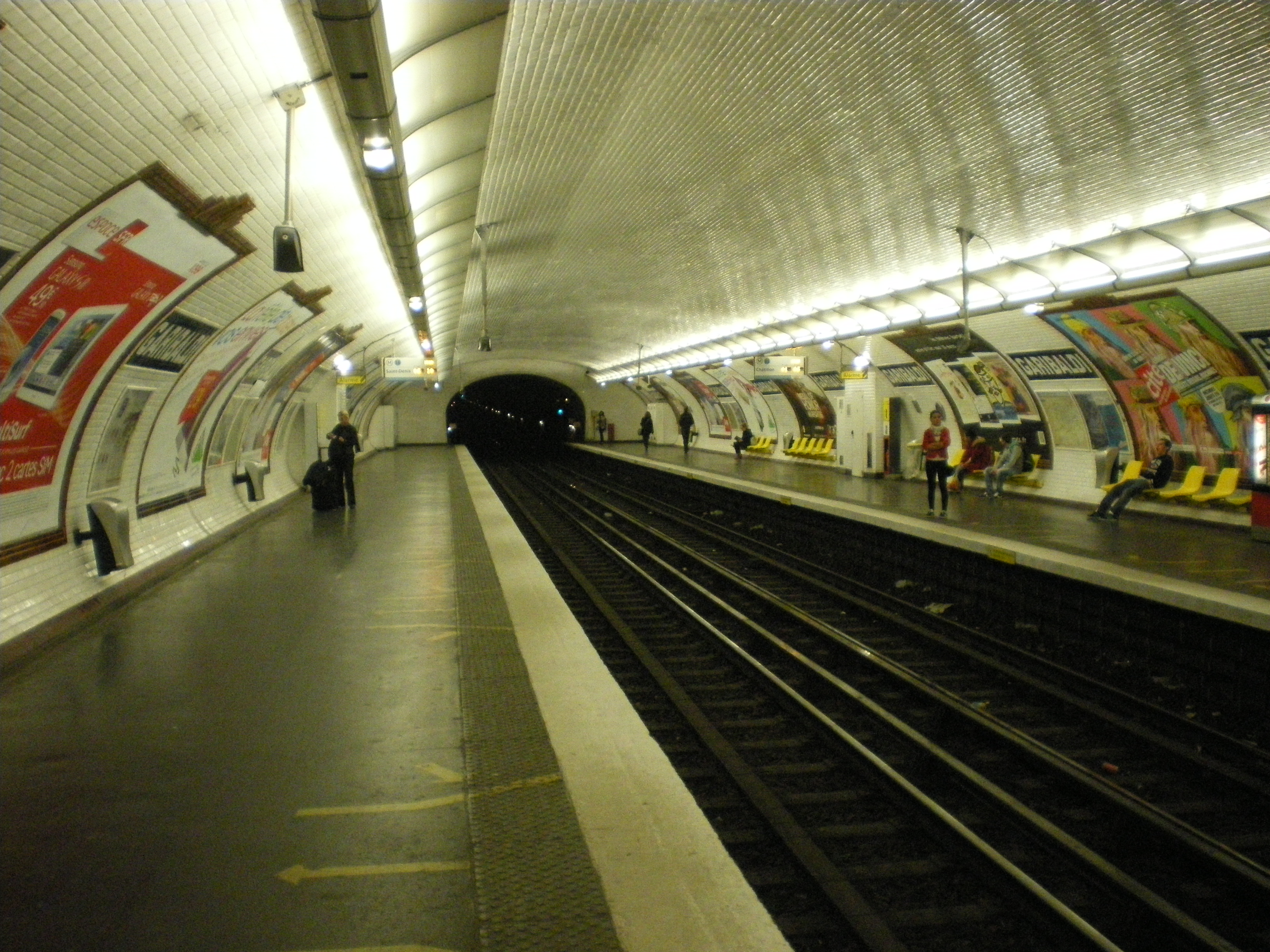 Station Garibaldi - métro 13